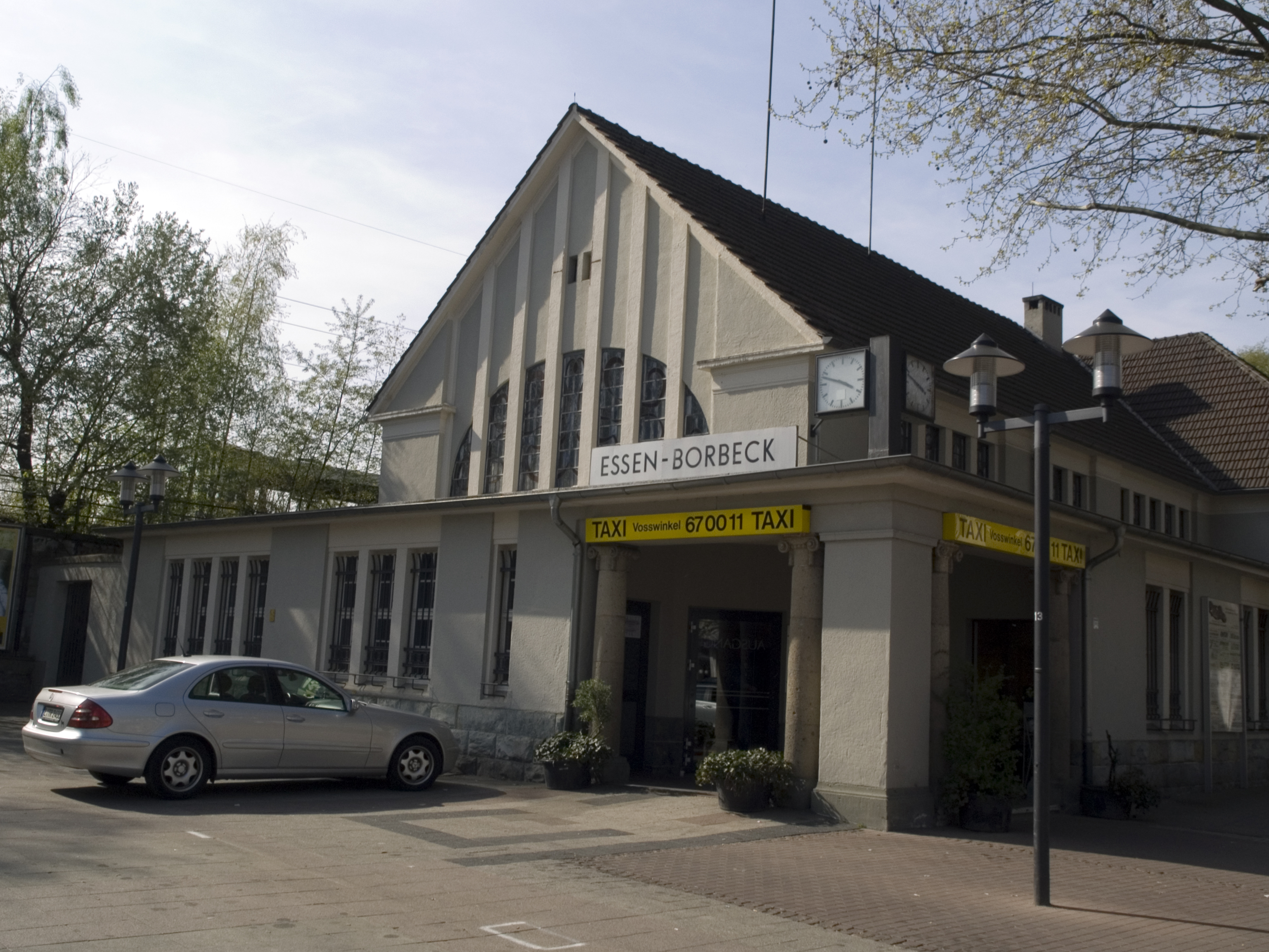 Северный Рейн - Вестфалия, Эссен - железнодорожная станция Борбек